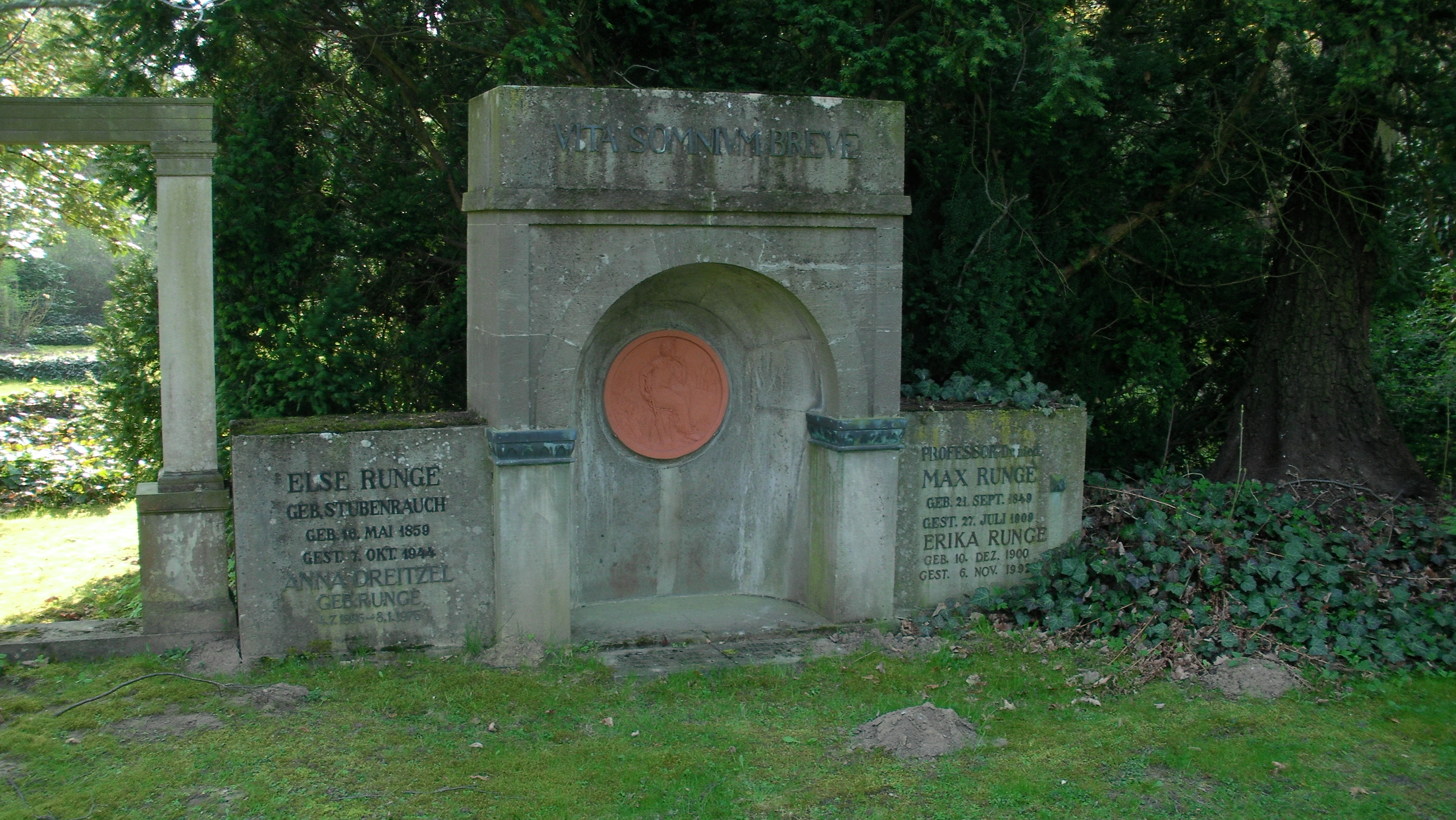 Grab des Gynäkologen Max Runge (1849–1909), seiner Gattin Else geb. Stubenrauch (1859–1944) und ihrer Töchter Anna Dreitzel geb. Runge (1896–1976) und Erika Runge (1900–1992) auf dem Göttinger Stadtfriedhof. Die Inschrift lautet VITA SOMNIVM BREVE („Das Leben ist ein kurzer Traum“).